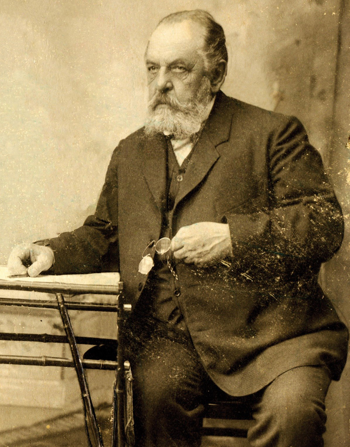 Вячеслав Евграфович Воробьёв - действительный статский советник, дореволюционная фотография